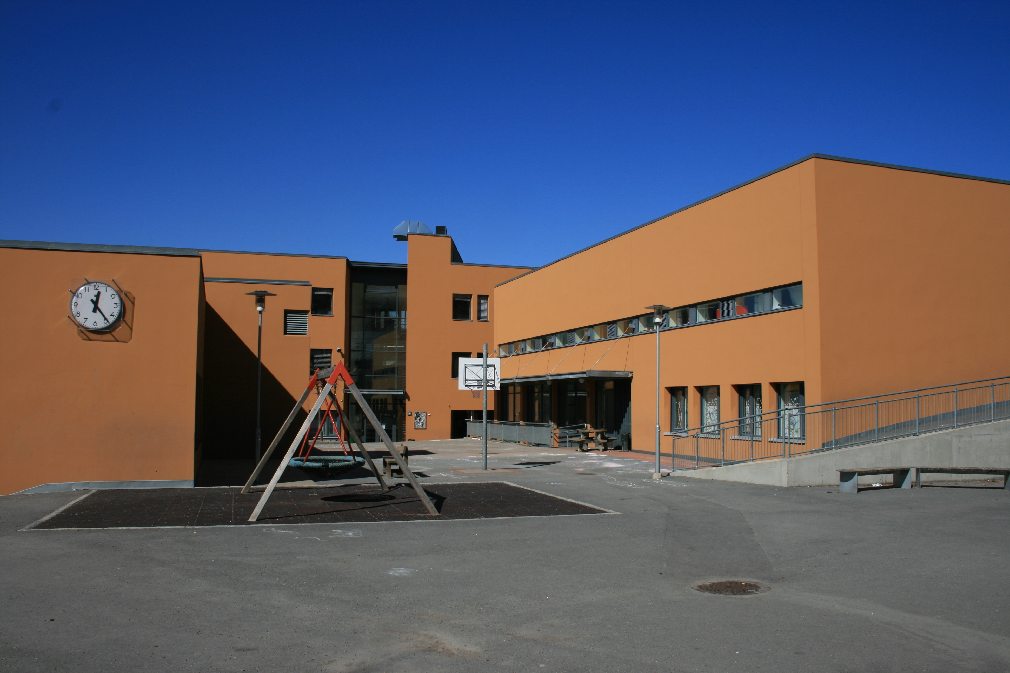 Disen school in Oslo.